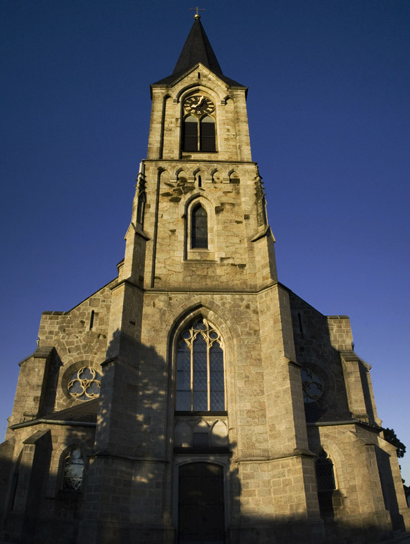 Sankt Anna Kirche in der Stadtgemeinde Pregarten, Oberösterreich, Österreich